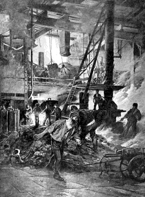 Inneres eines Stahlwerks